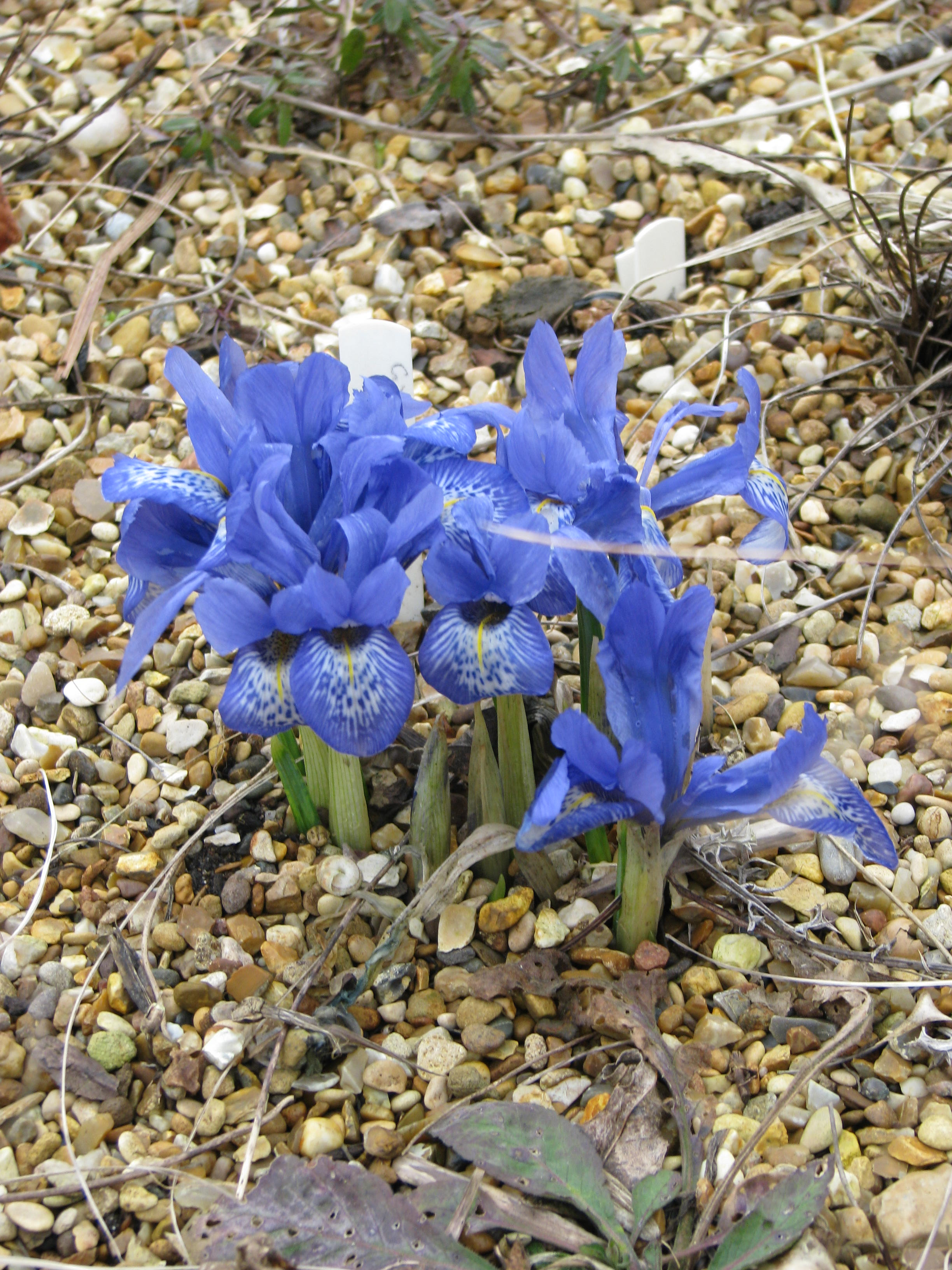 Little or no slug damage!